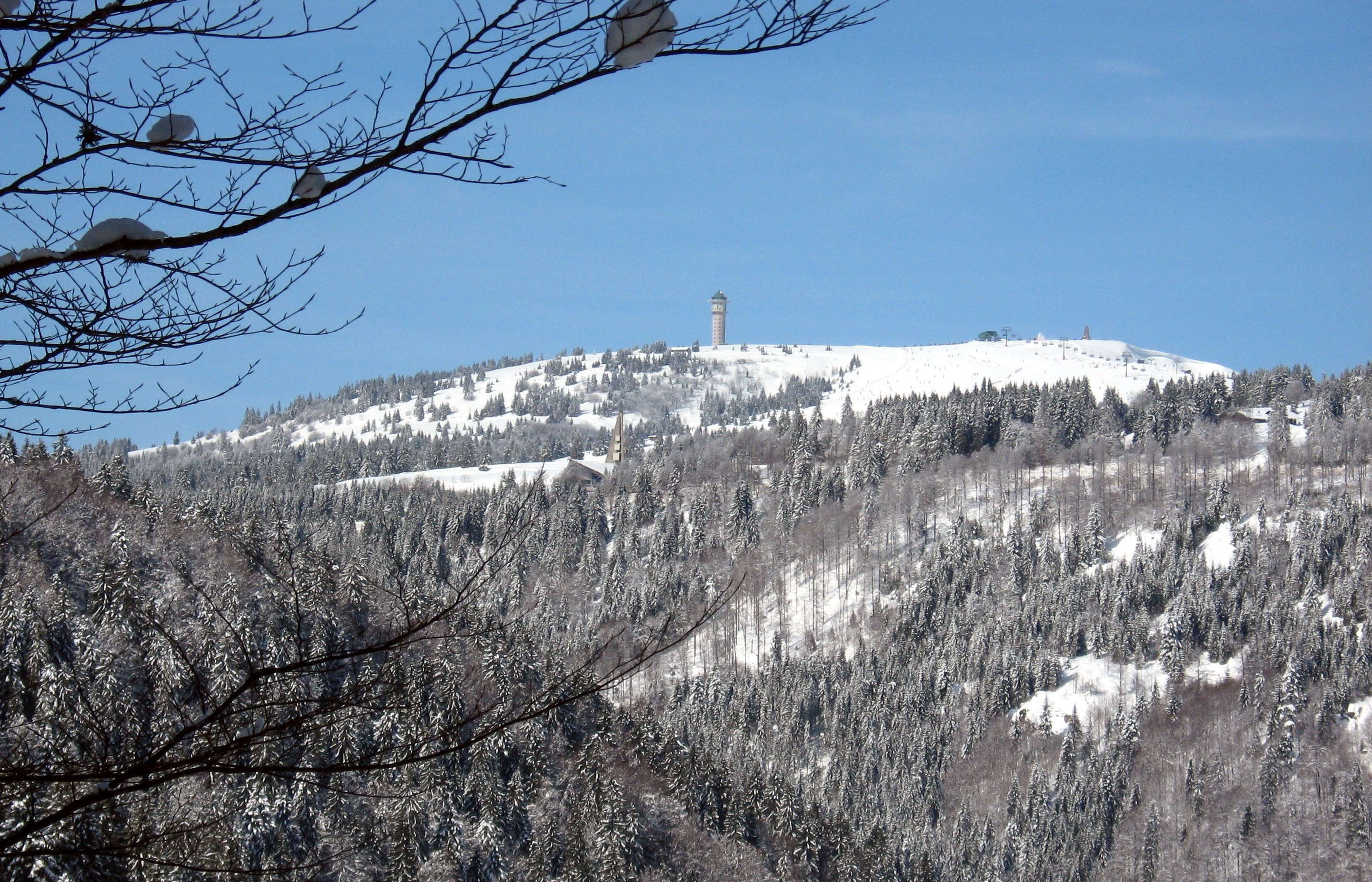 Blick auf den Feldberg (Berg im Schwarzwald) von Menzenschwand